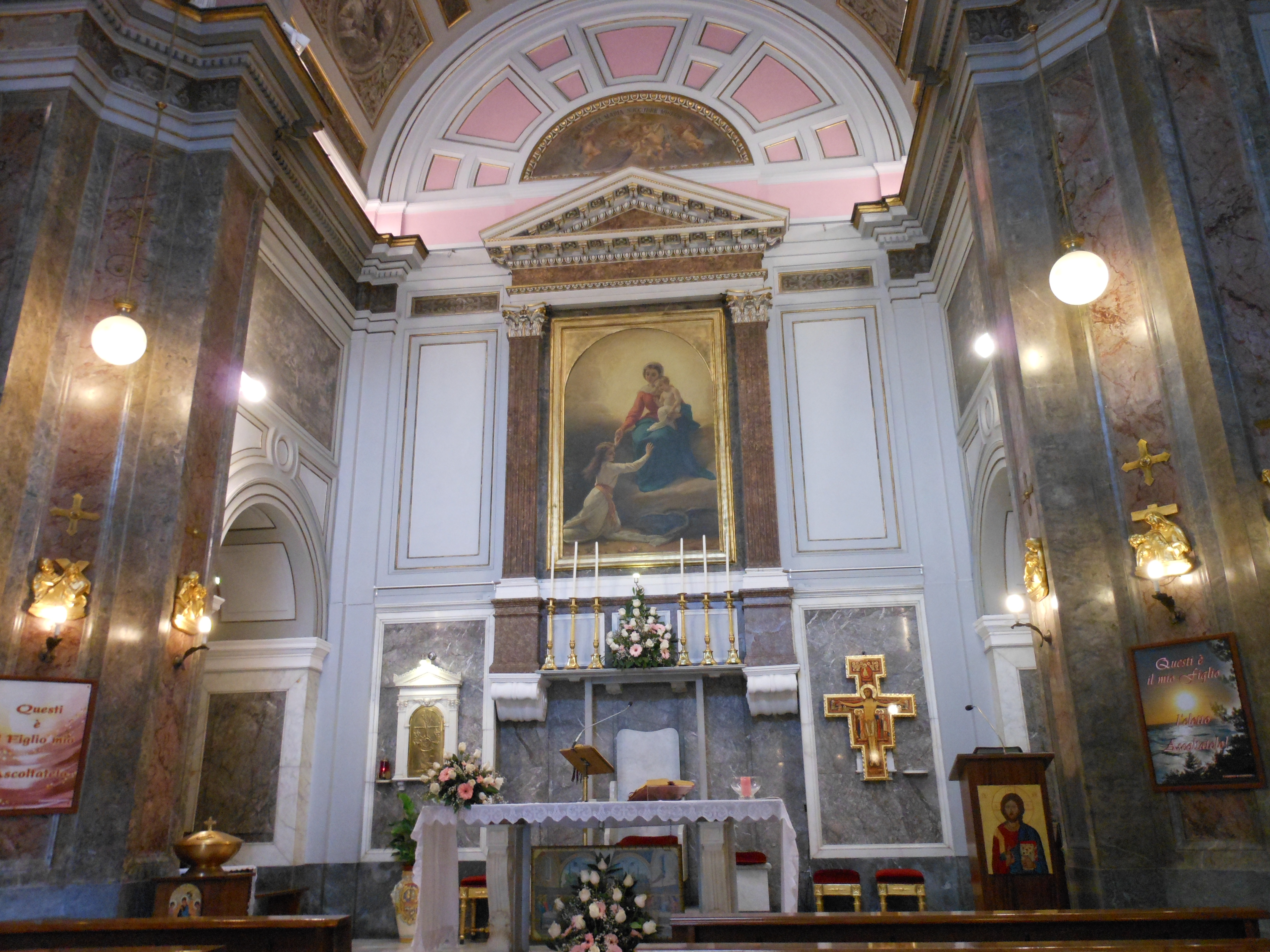 Interno della chiesa di Santa Maria del Soccorso a Capodimonte, sita a Napoli in corso Amedeo di Savoia